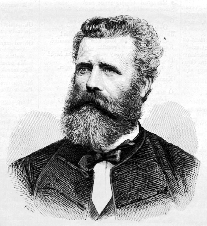 Szende Béla, 1839-ig Frummer Béla (1823–1882) honvéd százados Krassó vármegye alispánja, országgyűlési képviselő, honvédelmi miniszter (1872–1882) portréja. Rusz Károly metszete (1872)